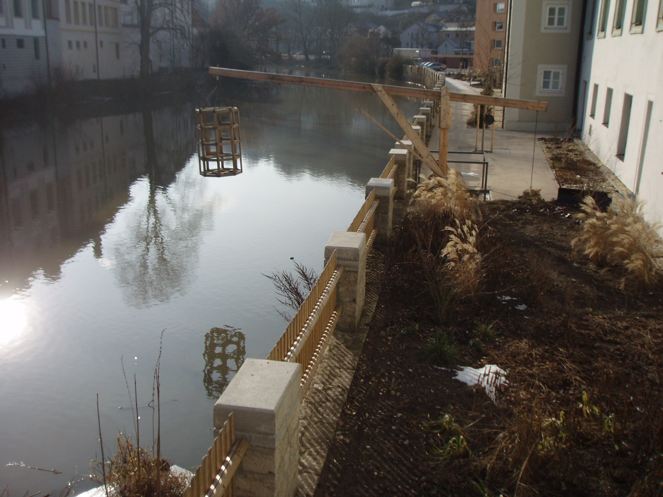 Nachbau einer Vorrichtung zur Bäckertaufe in Eichstätt